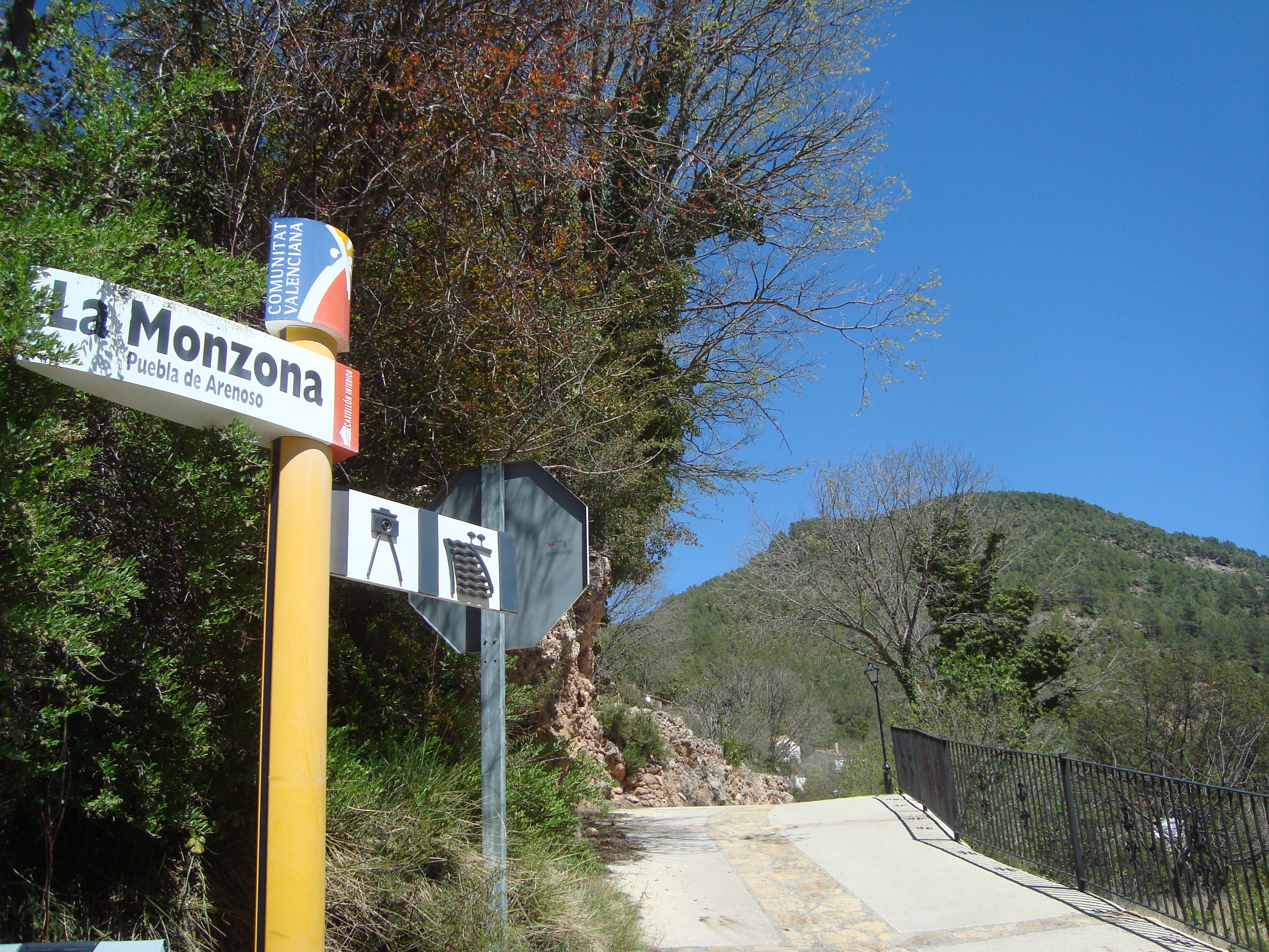 La Monzona (Puebla de Arenoso)